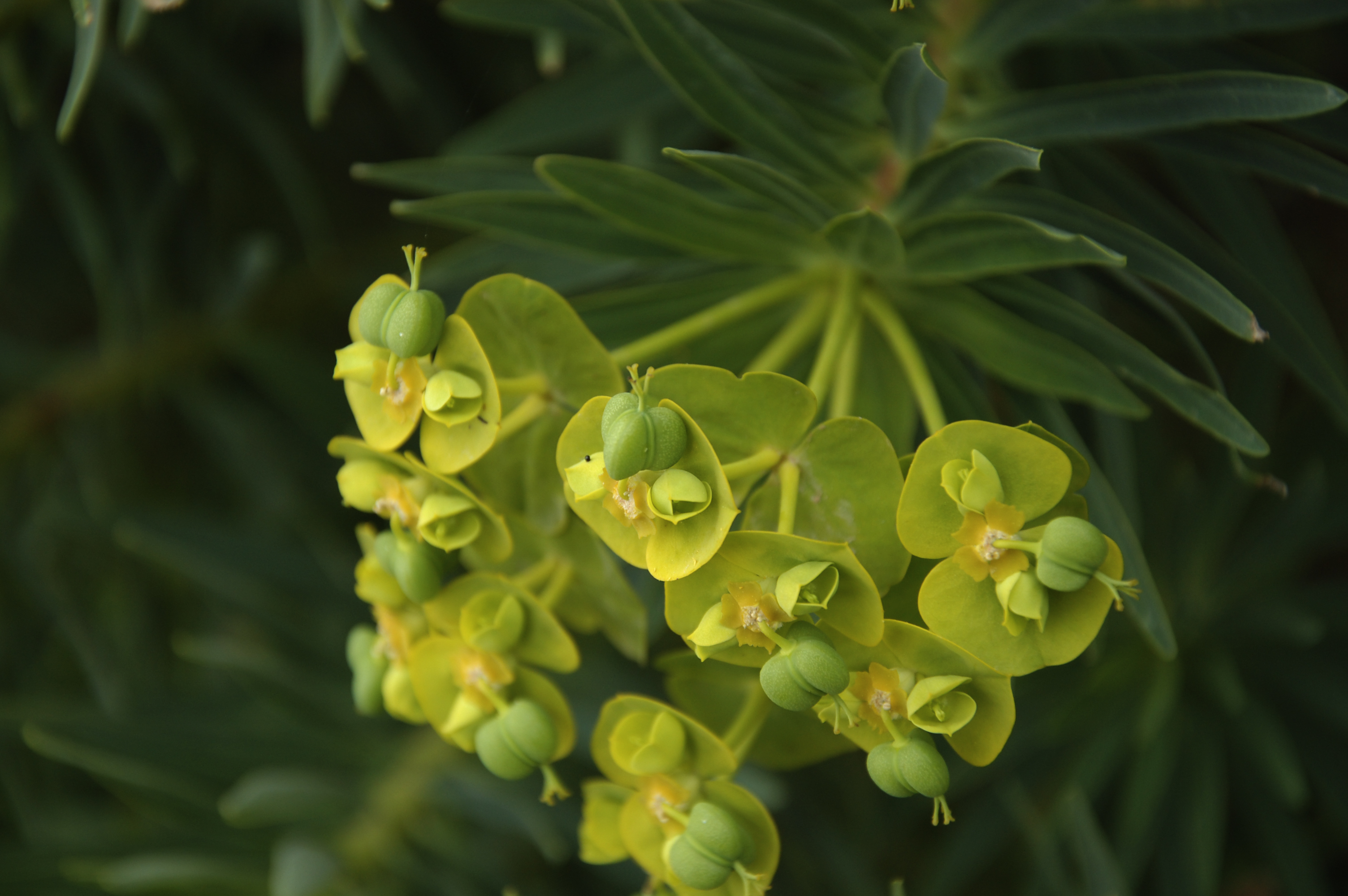 Euphorbia dendroides - fruits Zingaro, Sicily